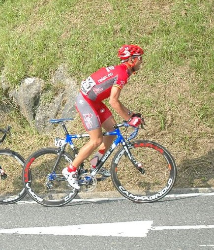 Francisco Mancebo, Euskal Bizikleta 2007